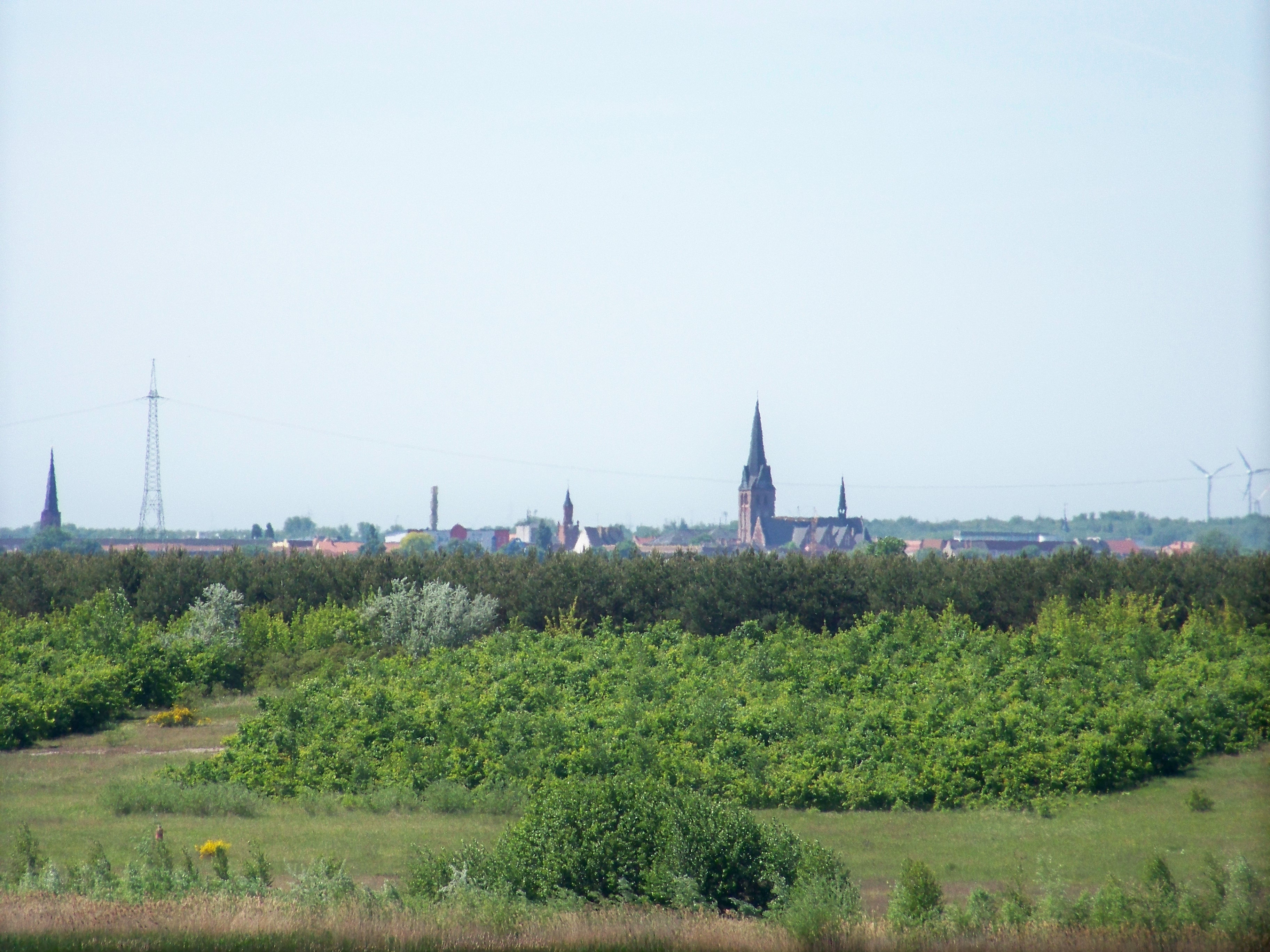 Blick von Pouch Richtung Bitterfeld